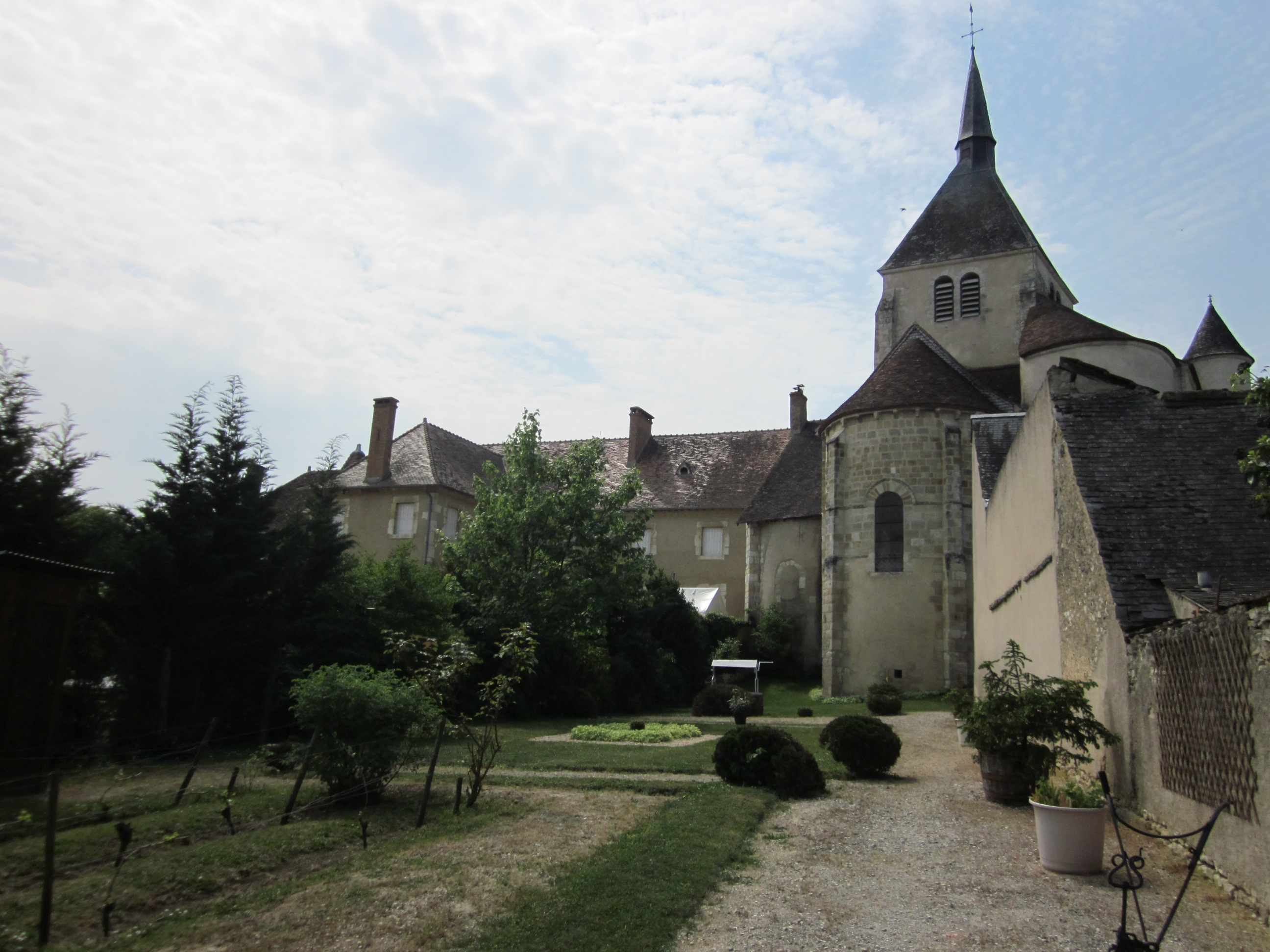 Chevet de l'église romane Saint-Denis à Reuilly (Indre). À gauche, le prieuré. Au premier plan, le jardin médiéval.